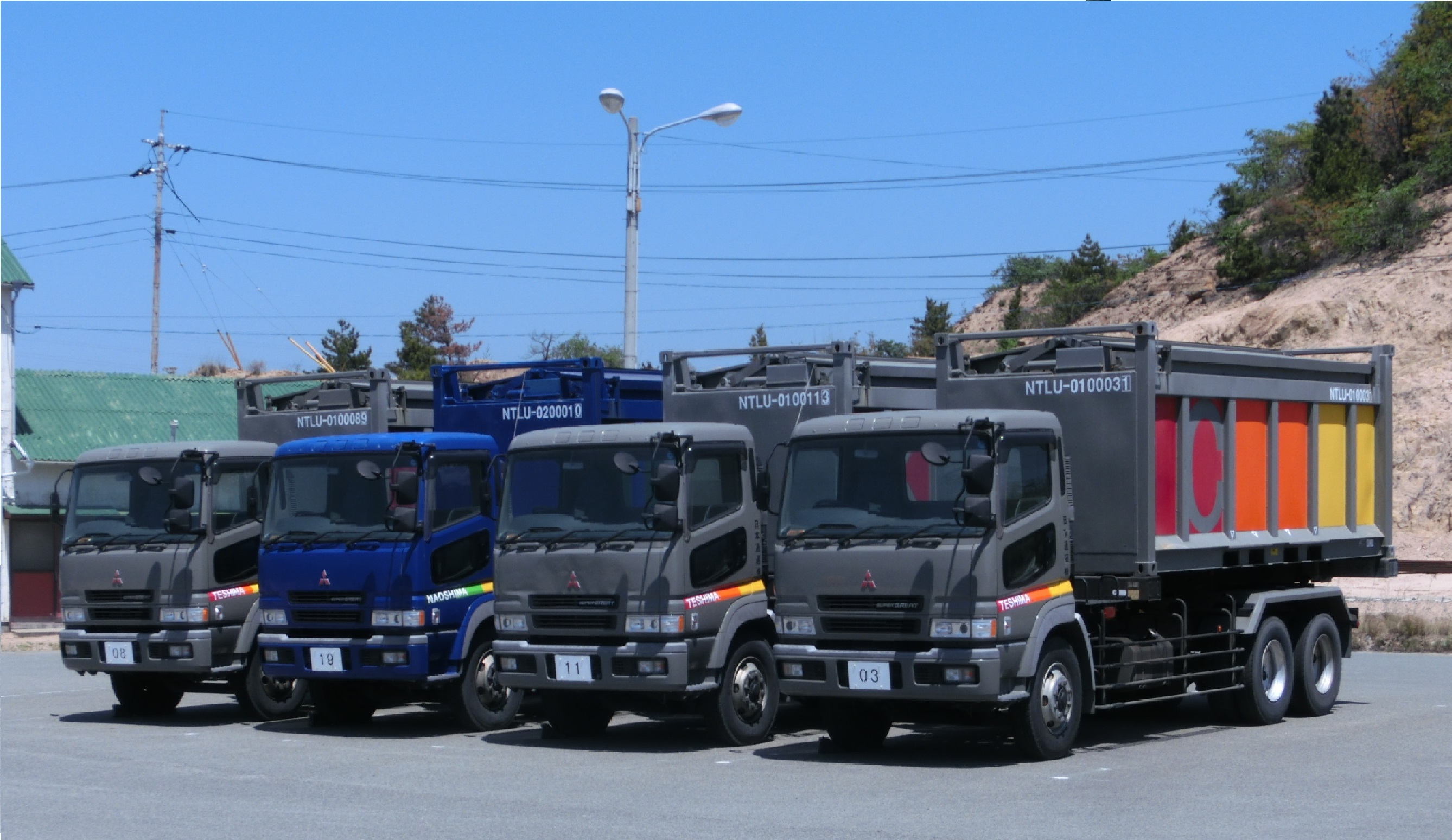 14年間にわたり稼動し続けてきた産廃専用コンテナを積載した、日本通運の専用ダンプカー。 午前中の便で多くのダンプカーが稼動した。 グレー色の豊島所属車と、青色の直島所属車が混ざり合って待機中の姿。